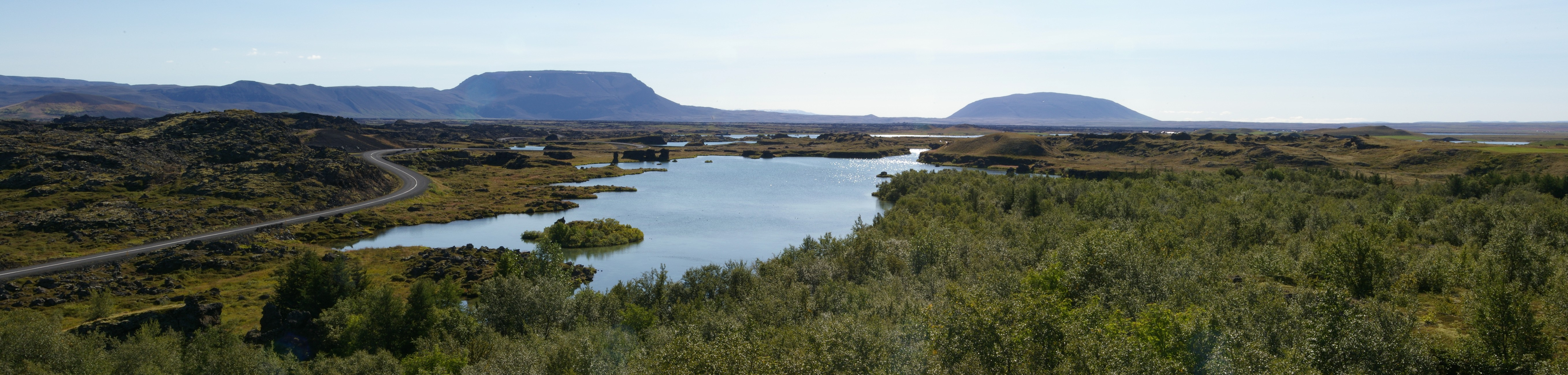 Mývatn from Höfdi nature park